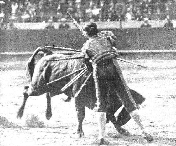 El matador español Agustín García "Malla" entrando a matar a volapié. La estocada le valió una oreja.